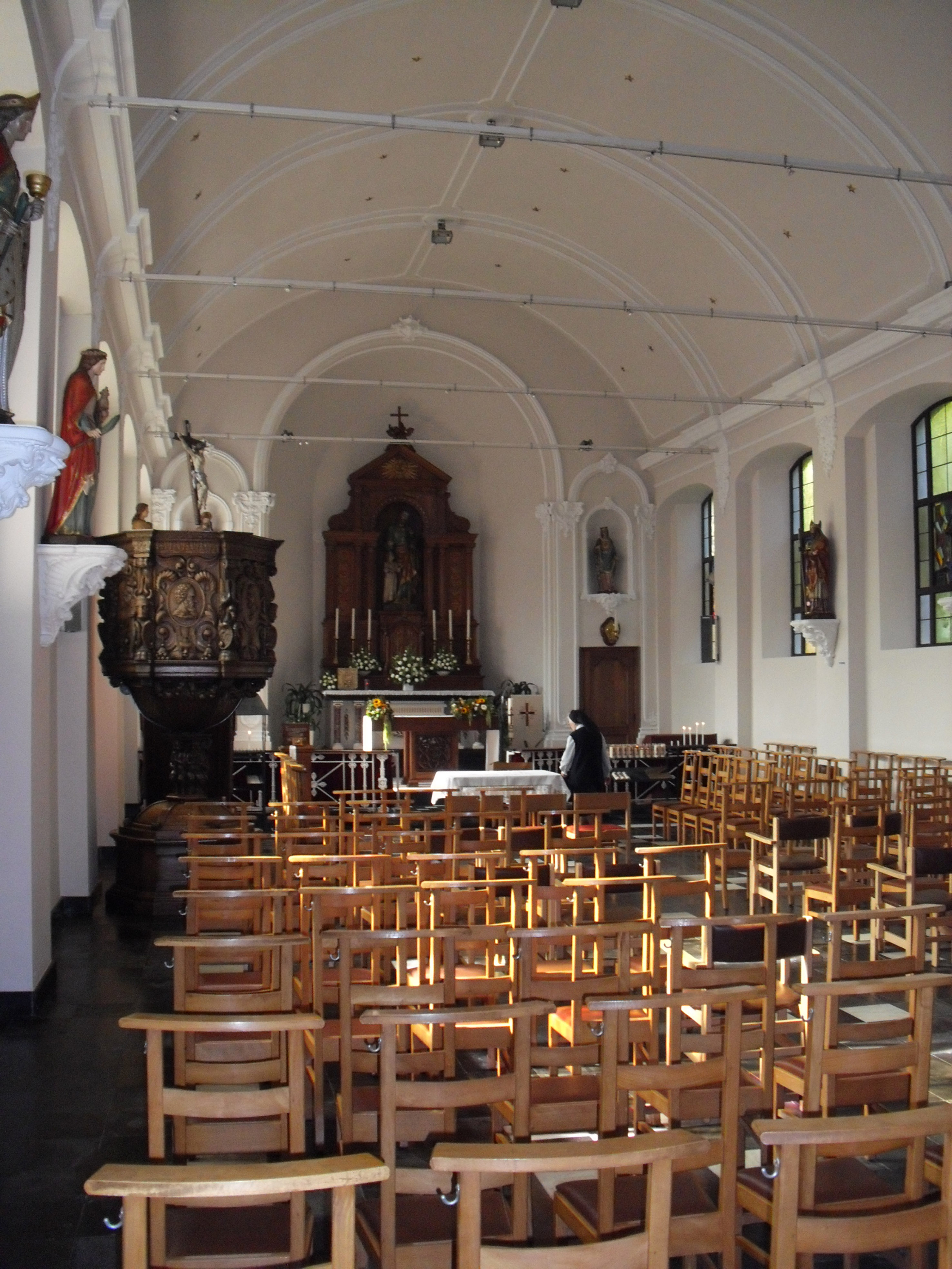 Sint-Jozefkapel - Sint-Jozefstraat - Tielrode - Temse - Oost-Vlaanderen - Vlaanderen - België